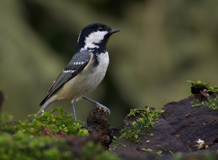 Periparus ater, Litovelské pomoraví, CZ